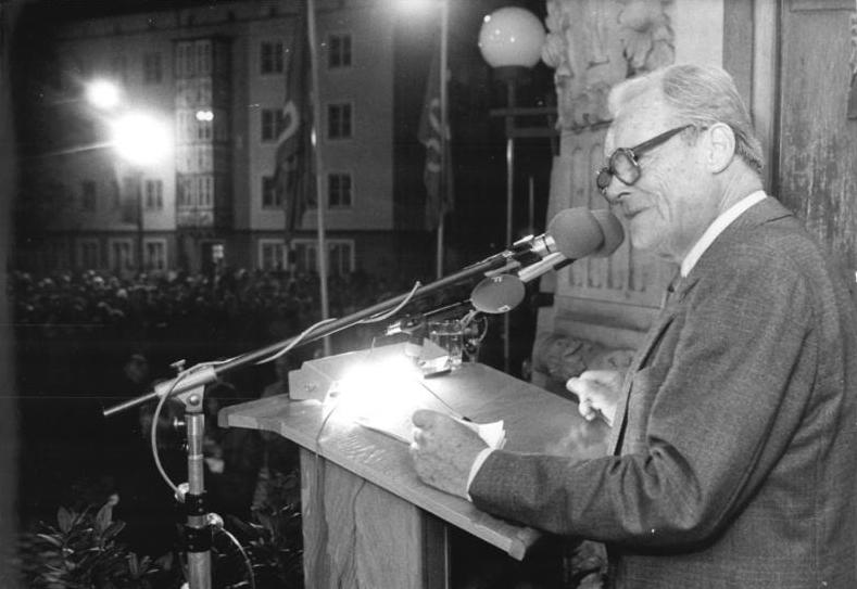 ADN-Frierich Gahlbeck-28.9.90-Bez.Halle: SPD-Wahlkundgebung in Dessau. Ehrenvorsitzender Willy Brandt wurde von den 5.000 Teilnehmern mit stürmischen Beifall begrüßt.